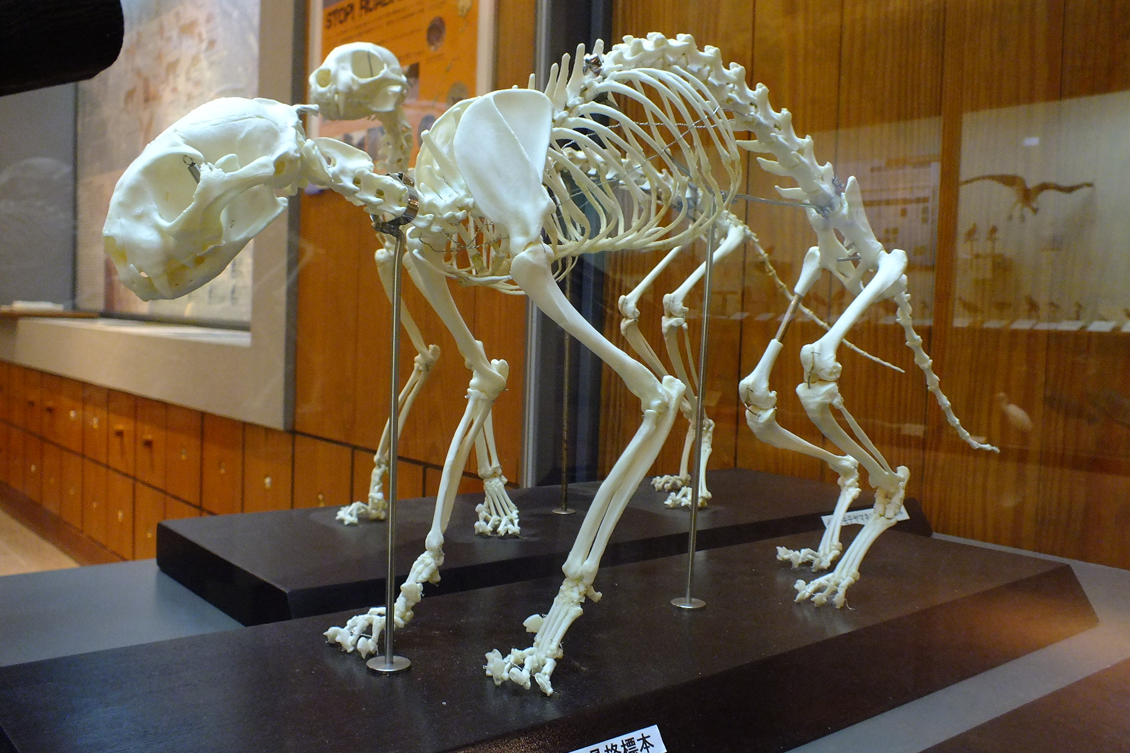 2017-01-29 Iriomote yamaneko in Iriomote-yasei-hogo-center 西表野生生物保護センター